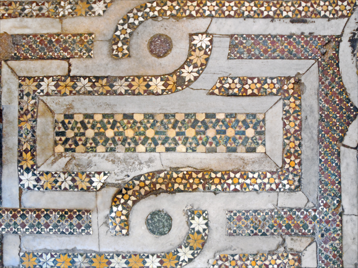 San Cataldo a été fondée à l'époque normande (12ème siècle) et a été le siège de l'ordre des Chevaliers du Saint Sépulcre. Elle est dans un style arabe caractérisé par sa forme carrée, ses merlons dentelés, ses arcatures et ses coupoles rosées. L'intérieur est structuré en 3 nefs séparées par des colonnes antiques de réemploi. Le pavement en mosaïque de marbre polychrome date de la construction. Article de Wikipedia